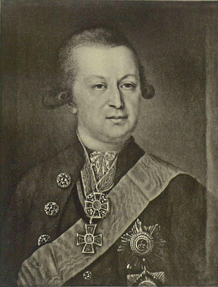 Kniaz' Gavriil Petrovich Gagarin, 1745-1808